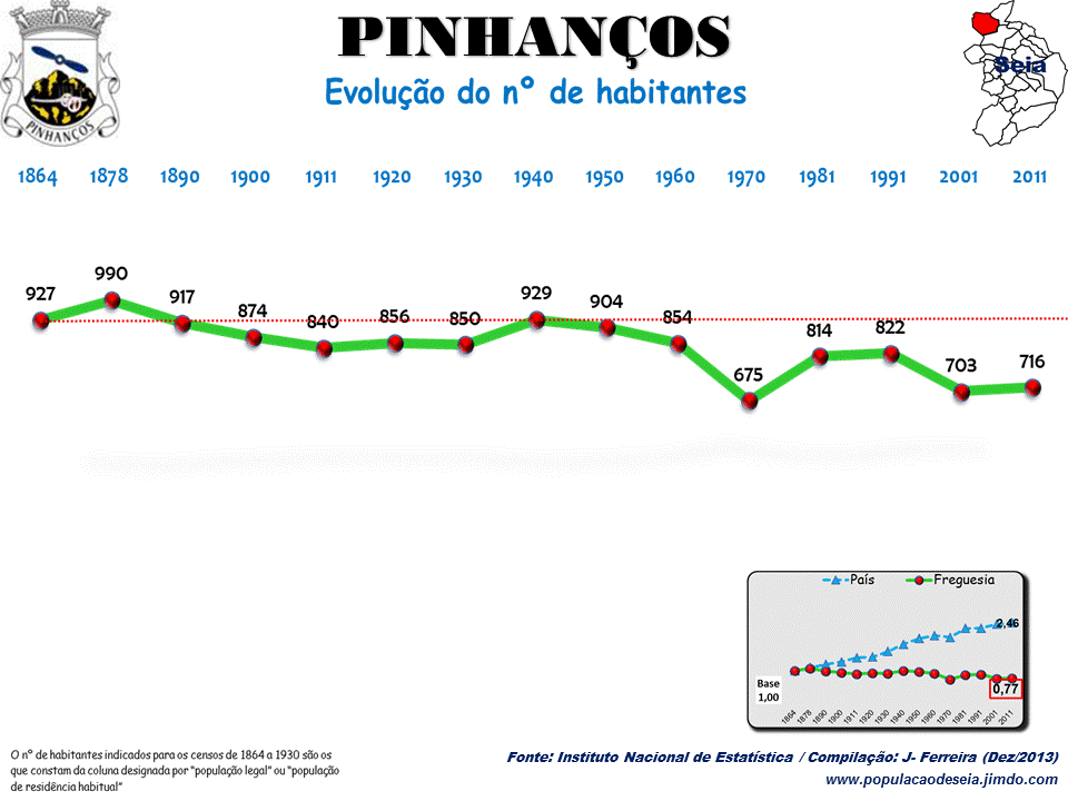 Evolução da População 1864 / 2011